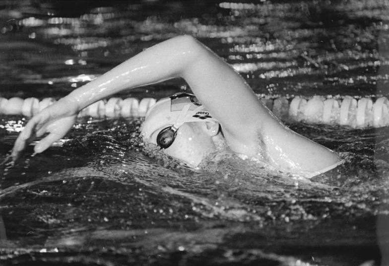 Manuela Stellmach ADN-ZB Oberst 20.12.88 Potsdam: DDR-Wintermeisterschaften im Schwimmen- Die Olymipamedaillengewinnerin von Soul Manuela Stellmach (SC Dynamo Berlin) erkämpfte sich auf der 25-m-Bahn den Meistertitel über 200 m Freistil in 1:58,79 min. (Foto vom Sprintpokal Dezember 1988)